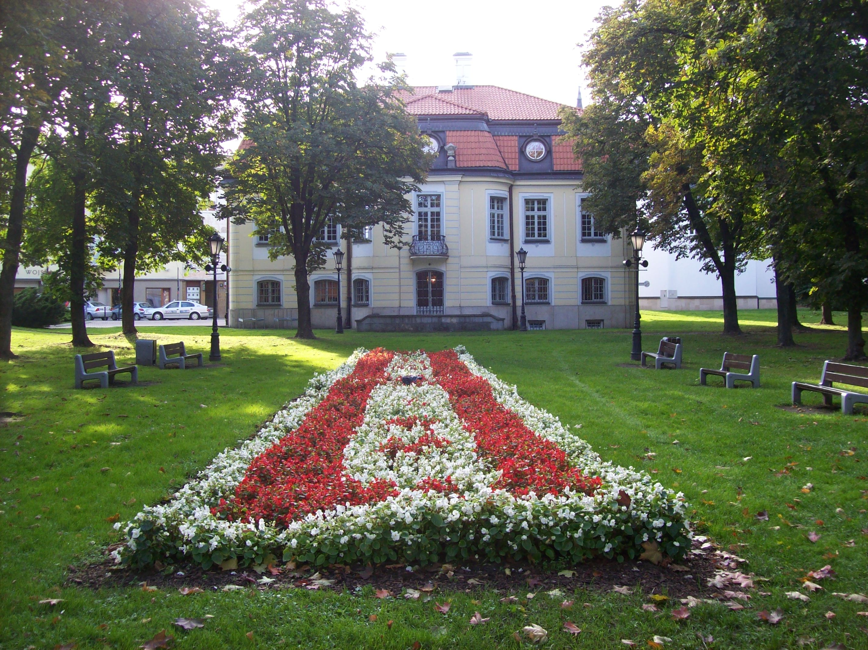 Białystok, ul. Klilńskiego 6 - Pałacyk gościnny Branickich, obecnie Urząd Stanu Cywilnego (zabytek nr A-214 z 14.07.1947 i 1 z 20.01.1953)